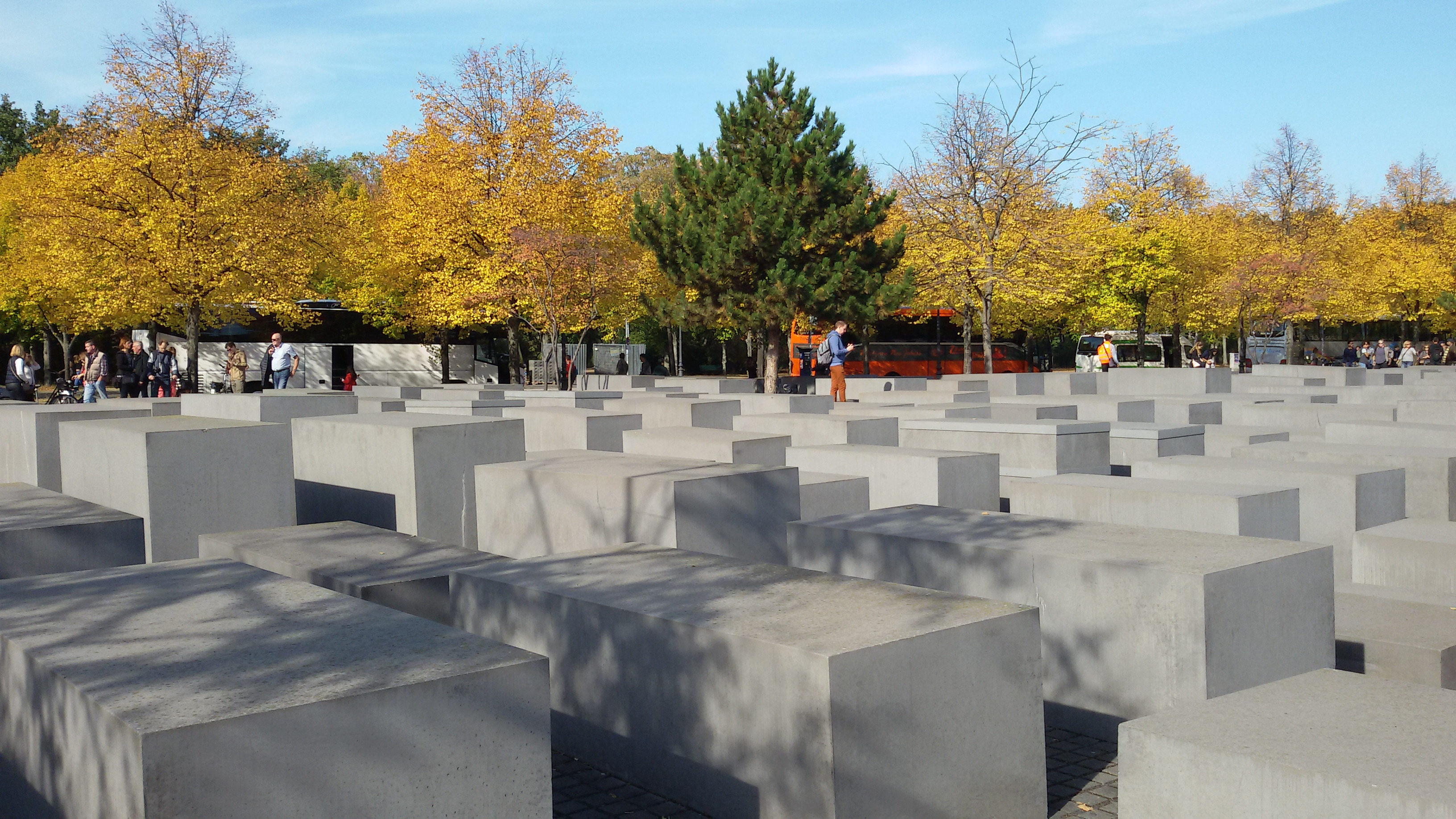 വർഗവിദ്വേഷം മൂലം ജീവൻ നഷ്ടപ്പെട്ട അറുപതു ലക്ഷത്തിൽ പരം ജൂതന്മാർക്കായുള്ള സ്മാരകം